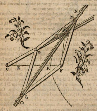 Hyperbelzirkel des Frans van Schooten (1657)